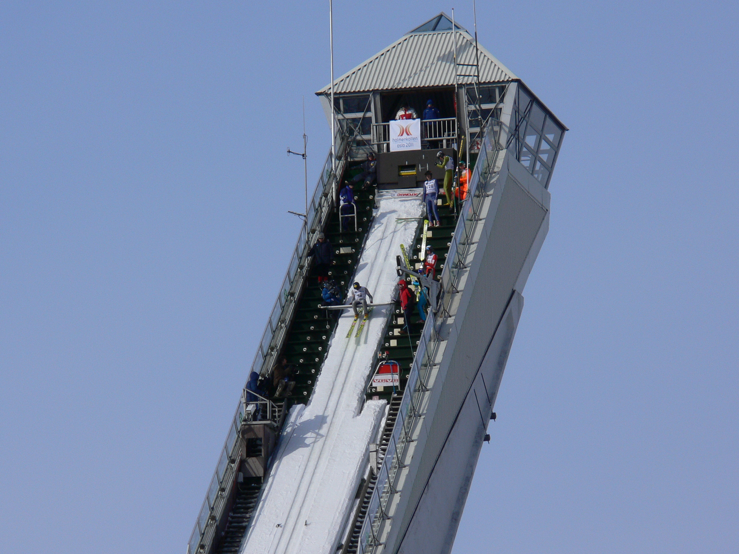 Holmenkollen Ski Jumping Hill (Holmenkollbakken) in Oslo, Norway. From a Nordic Combined World Cup event in Holmenkollen in 2006